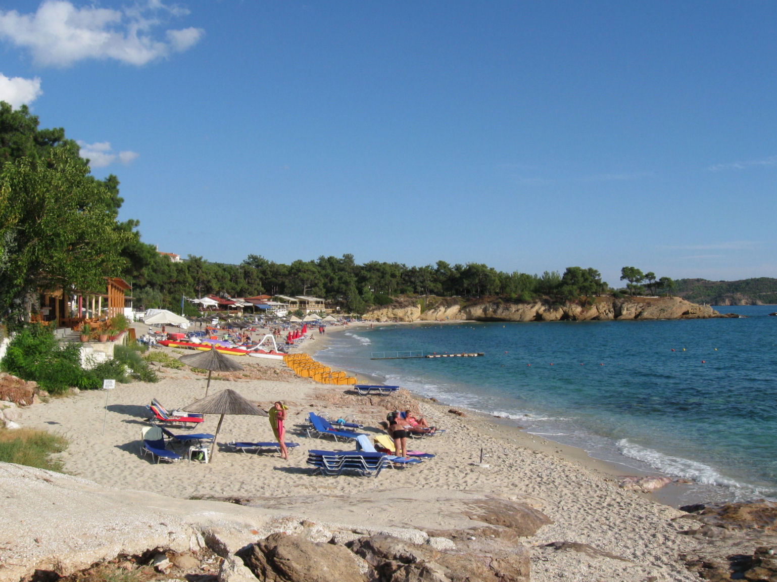 Pefkari-Strand (2008)